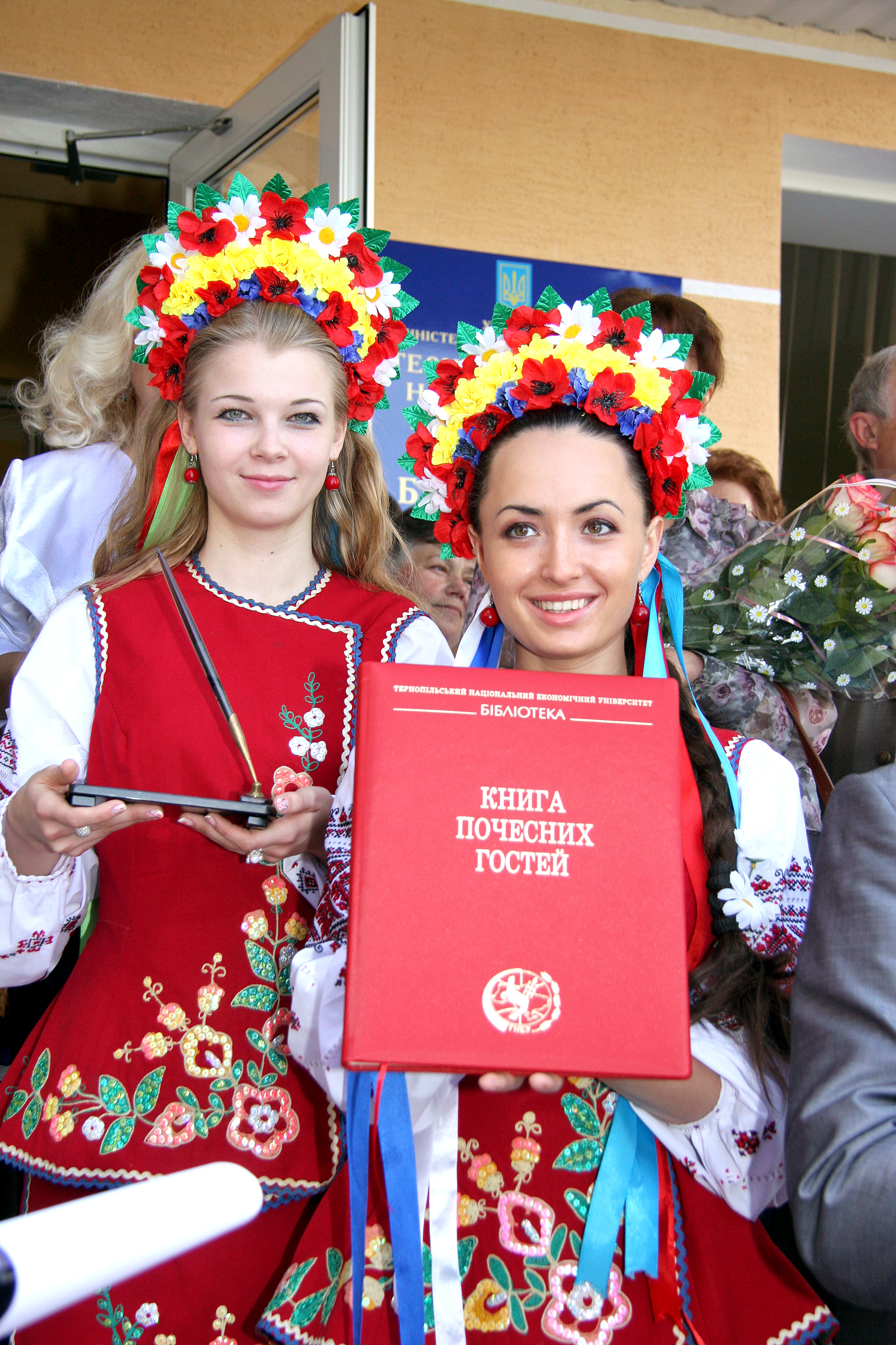 Книга почесних гостей бібліотеки